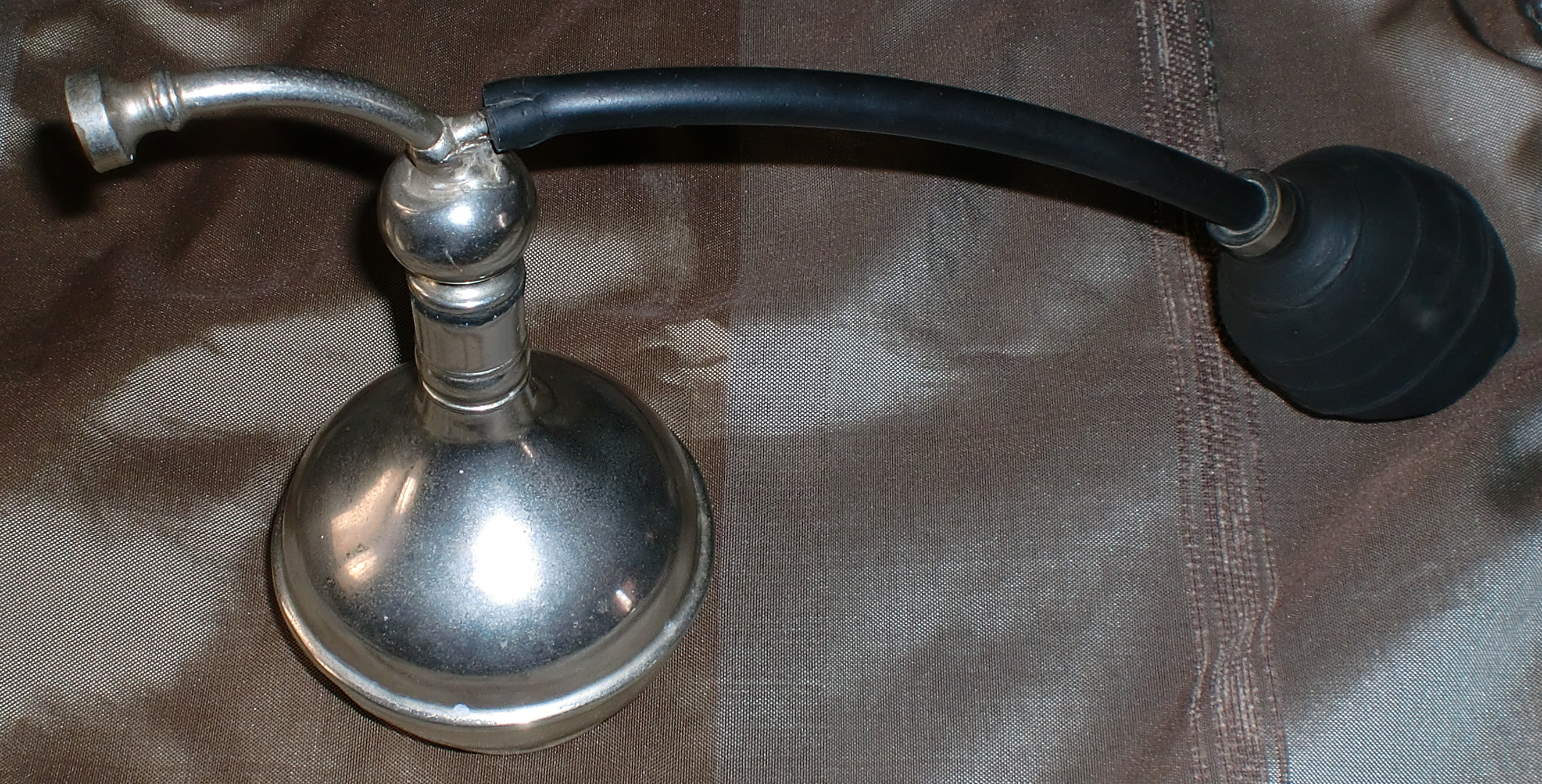 Talquera antigua de peluquería de caballeros. Se solía usar en la nuca.